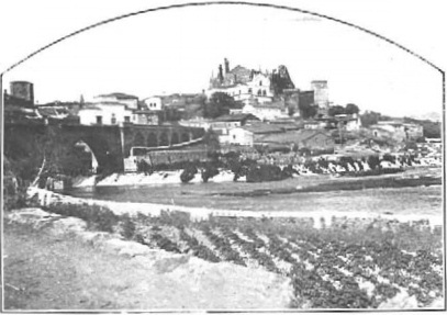 'Vista General de Plasencia, obra del fotógrafo Venancio Gombau, recogido en la revista española La ilustración española y americana.